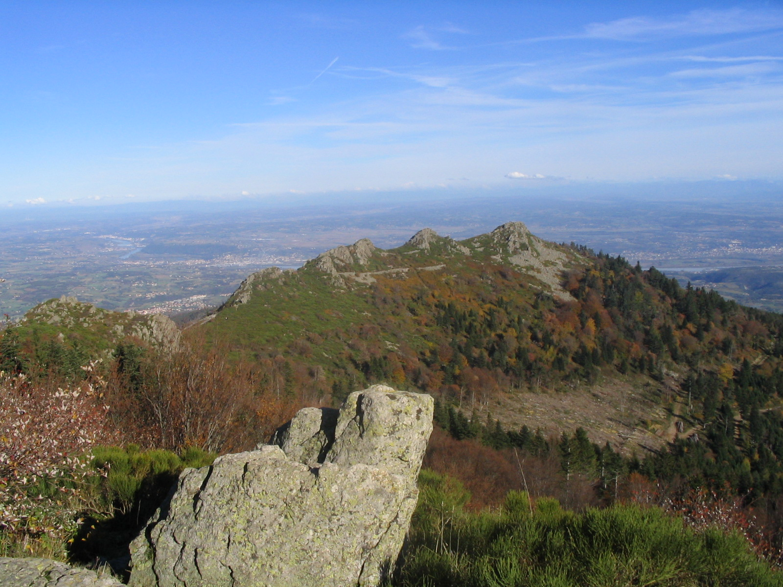 Dans le massif du Pilat, les trois dents